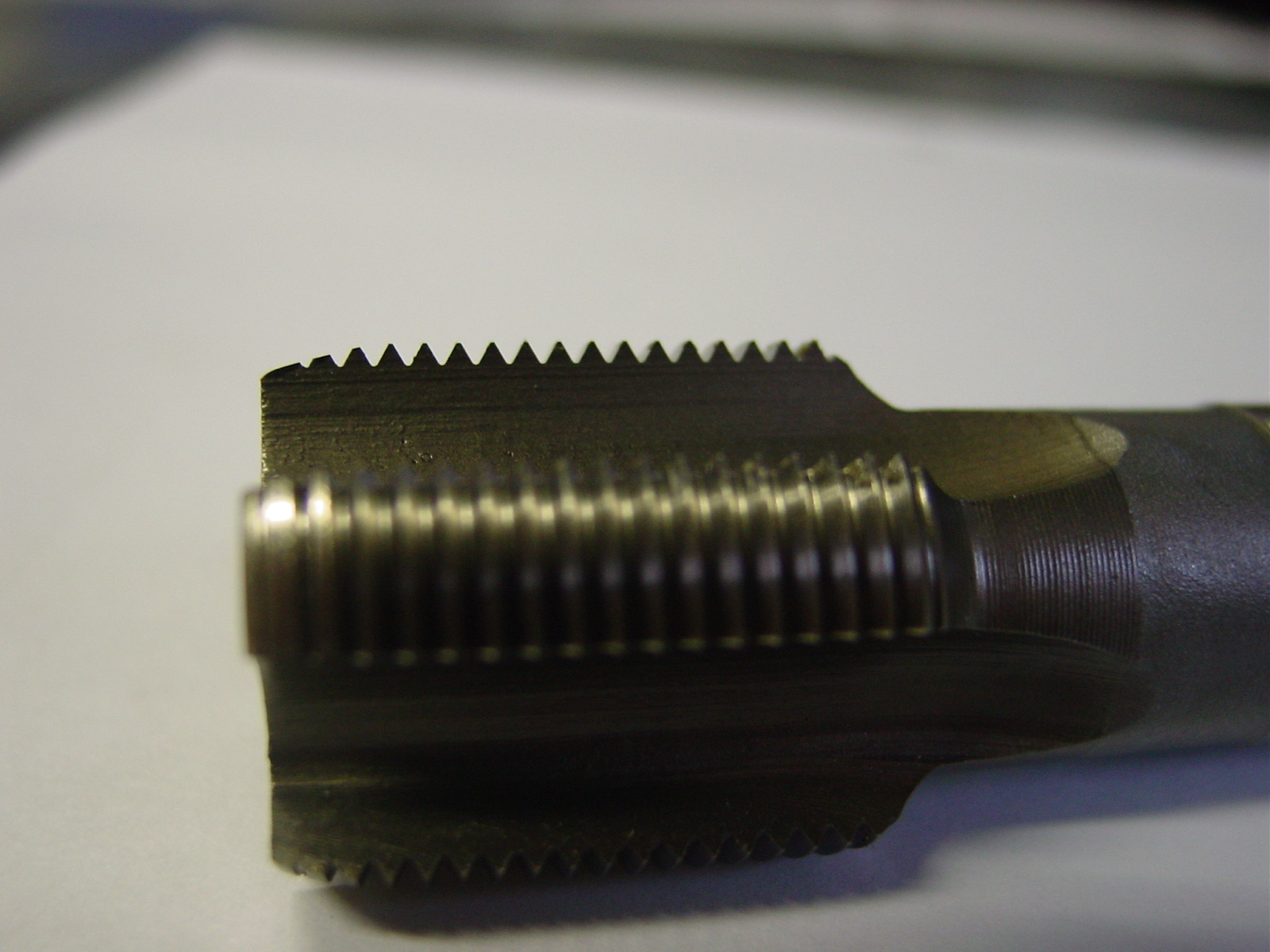 detail screen of the cutting edges- M24x2 machine screw tap, 4 grooves, short ingate / Detailbild der Schneiden - M24x2 Maschinengewindebohrer, 4 Spannuten, kurzer Anschnitt